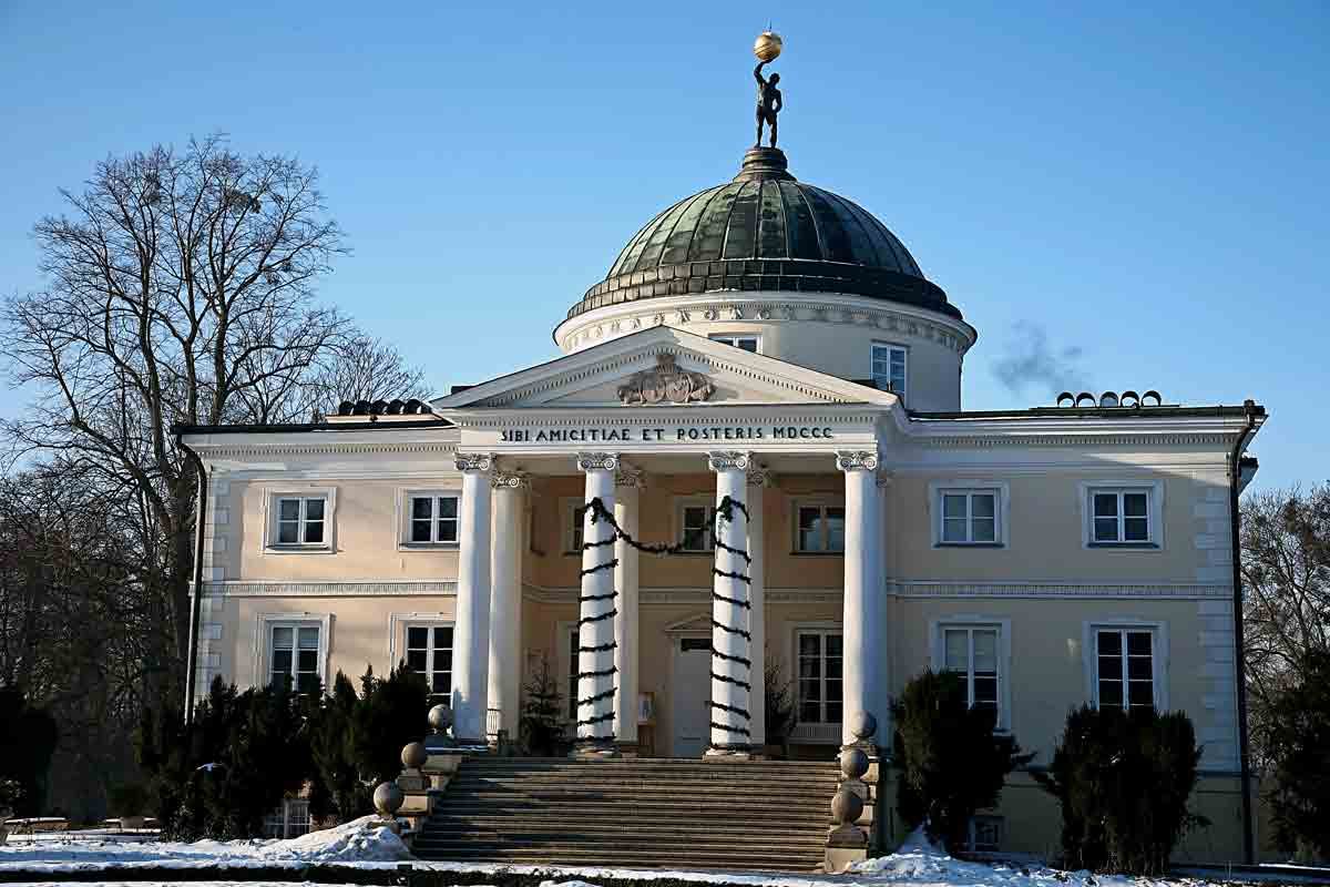 Pałac w Lubostroniu. Autor: Michał "Cronwood" Babilas